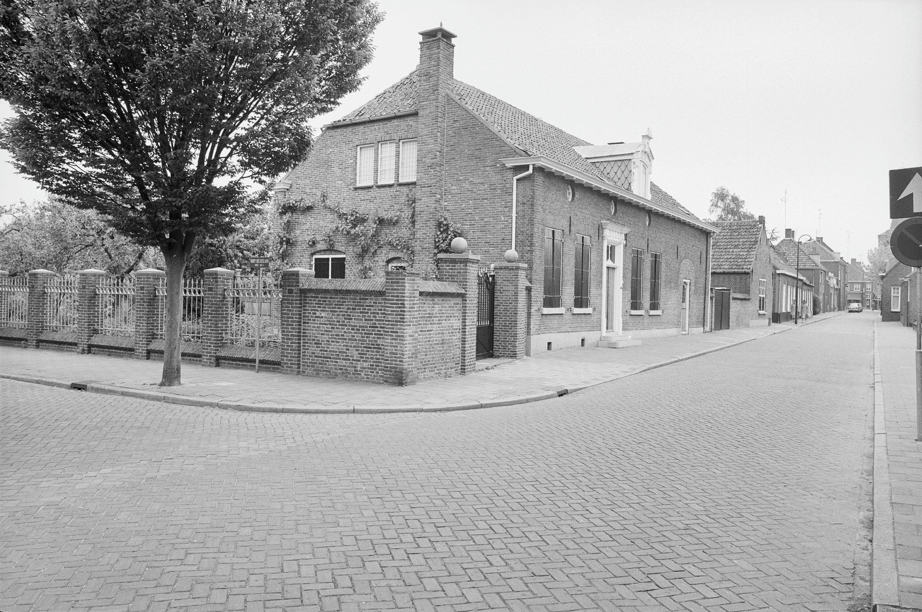 J. Heestershuis-Museum: voor en linker zijgevel